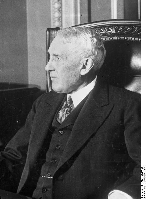 Der amerikanische Staatssekretär Kellogg erhält den Friedens-Nobelpreis ! Der amerikanische Staats-Sekretär Kellogg erhielt den Friedens-Nobelpreis für 1930.